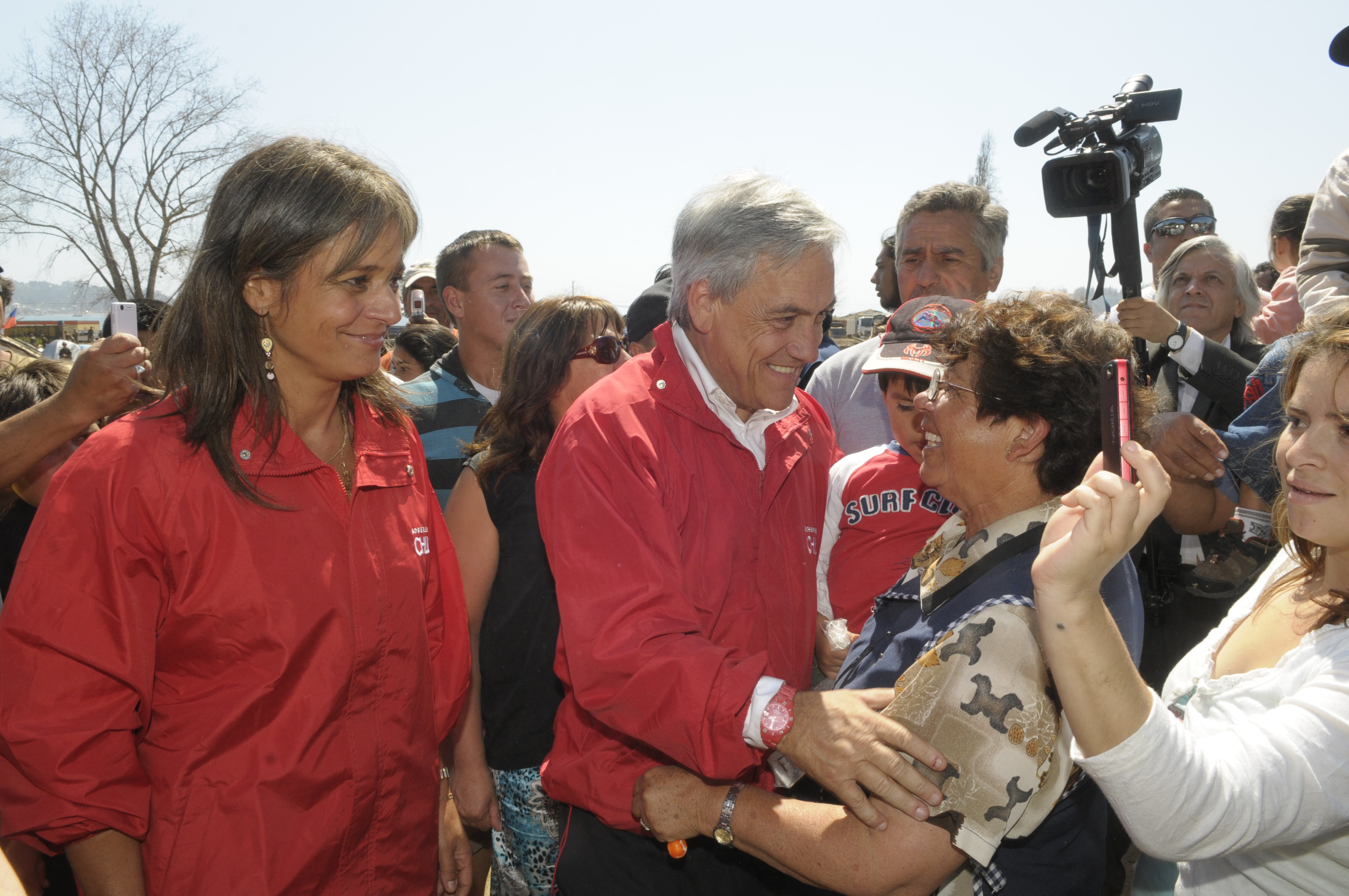 Piñera y van Rysselberghe en Dichato.